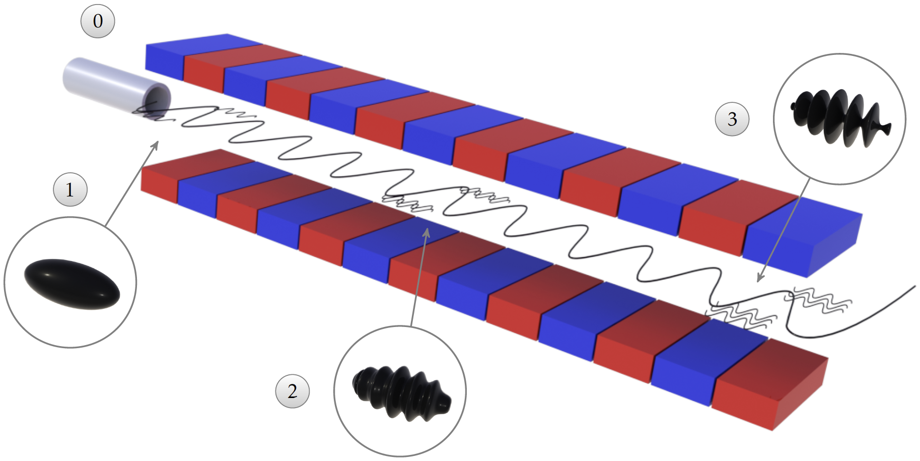 Générer une impulsion à partir d'un laser à électrons libres en quatre étapes